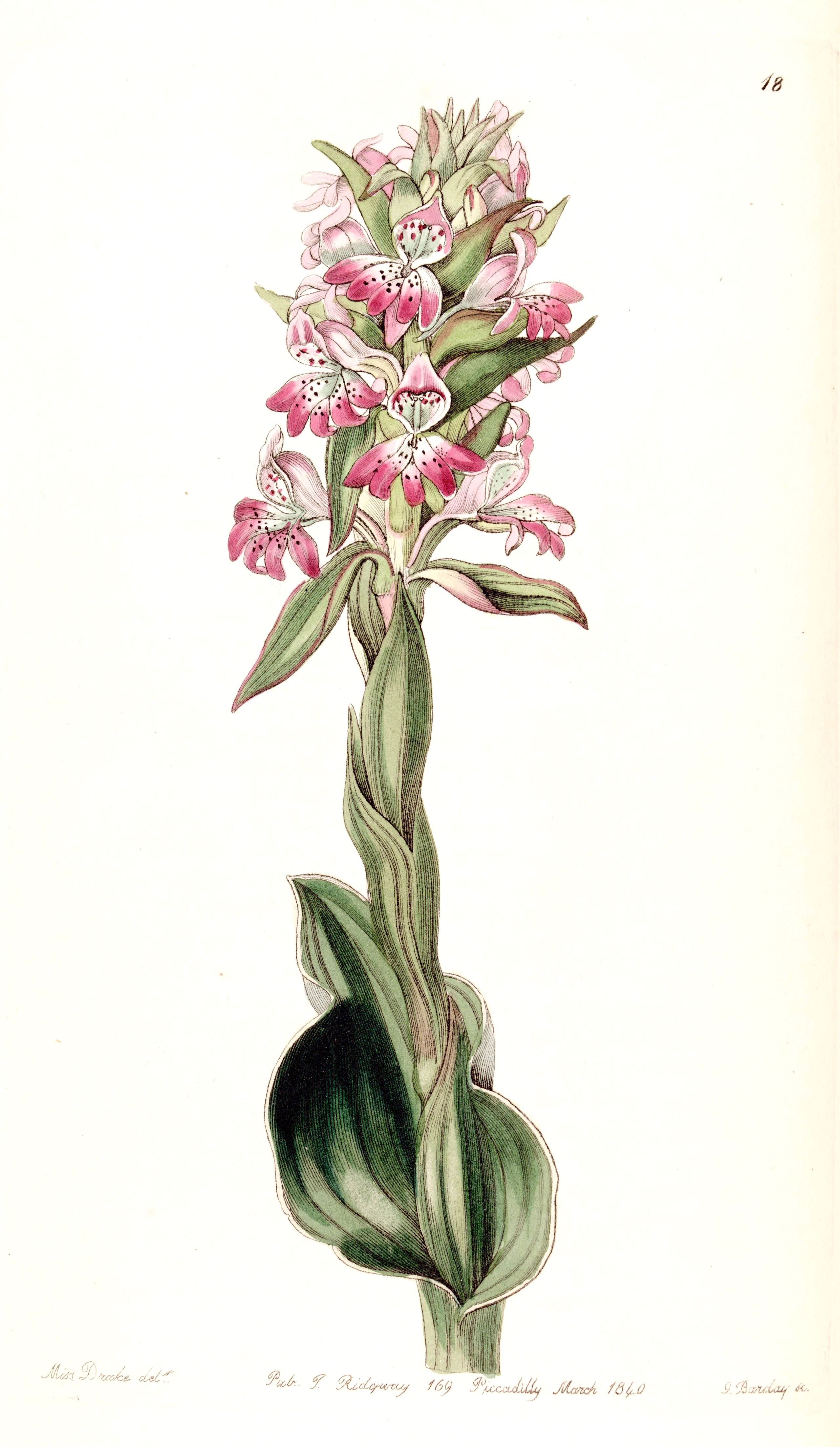 Satyrium erectum (as syn. Satyrium pustulatum)